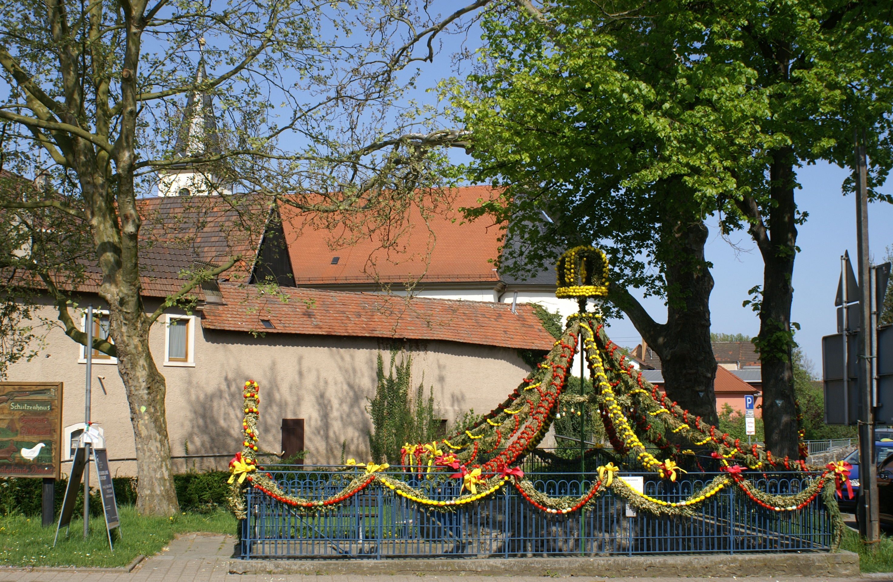 Der Reisbrunnen in Steinsfurt diente bis zum Bau der Wasserleitung im Jahr 1909 der Trinkwasserversorung.